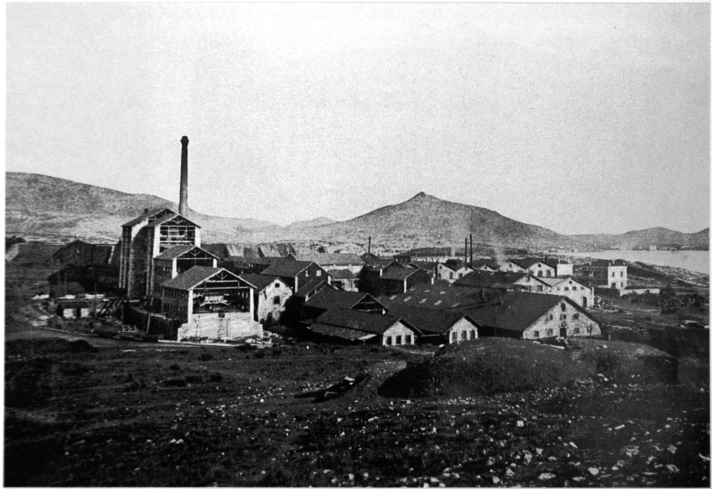 Usine de la Compagnie française des mines du Laurion à côté d'Athènes en Grèce, photographie faite aux alentours de 1890.